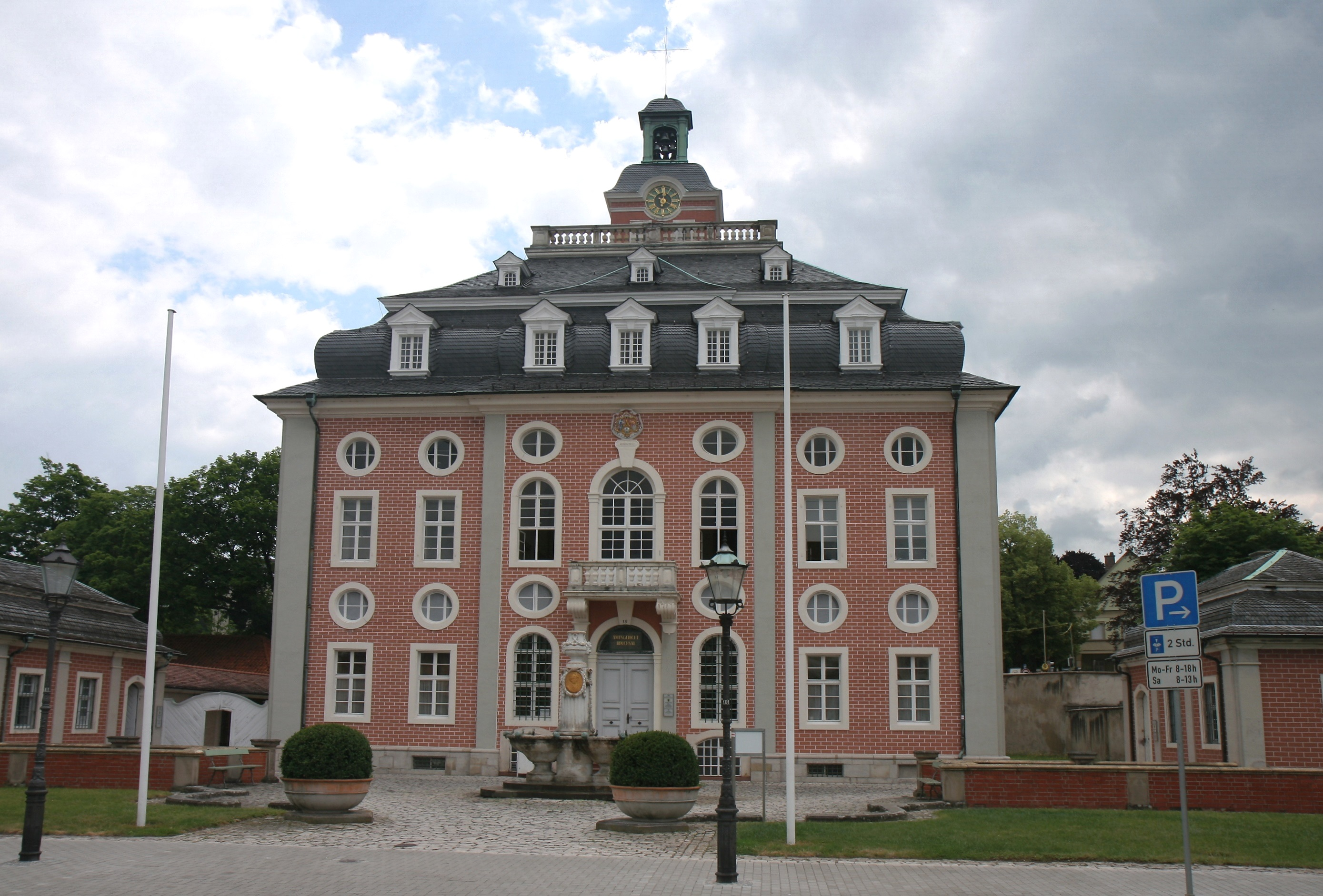 Amtsgericht Bruchsal - Verwaltung, Strafabteilungen, Vormundschaftsgericht, Gerichtszahlstelle -, Schönbornstraße 18 in Bruchsal. Gebäudeteilbeschreibung nach angebrachter Tafel: Kanzleibau. 1729-1733 erbaut als fürstbischöfliches Verwaltungsgebäude mit Archiv und Registraturen. Nach 1803 Großherzoglich Badische Verwaltung. Ab 1876 Amtsgericht.